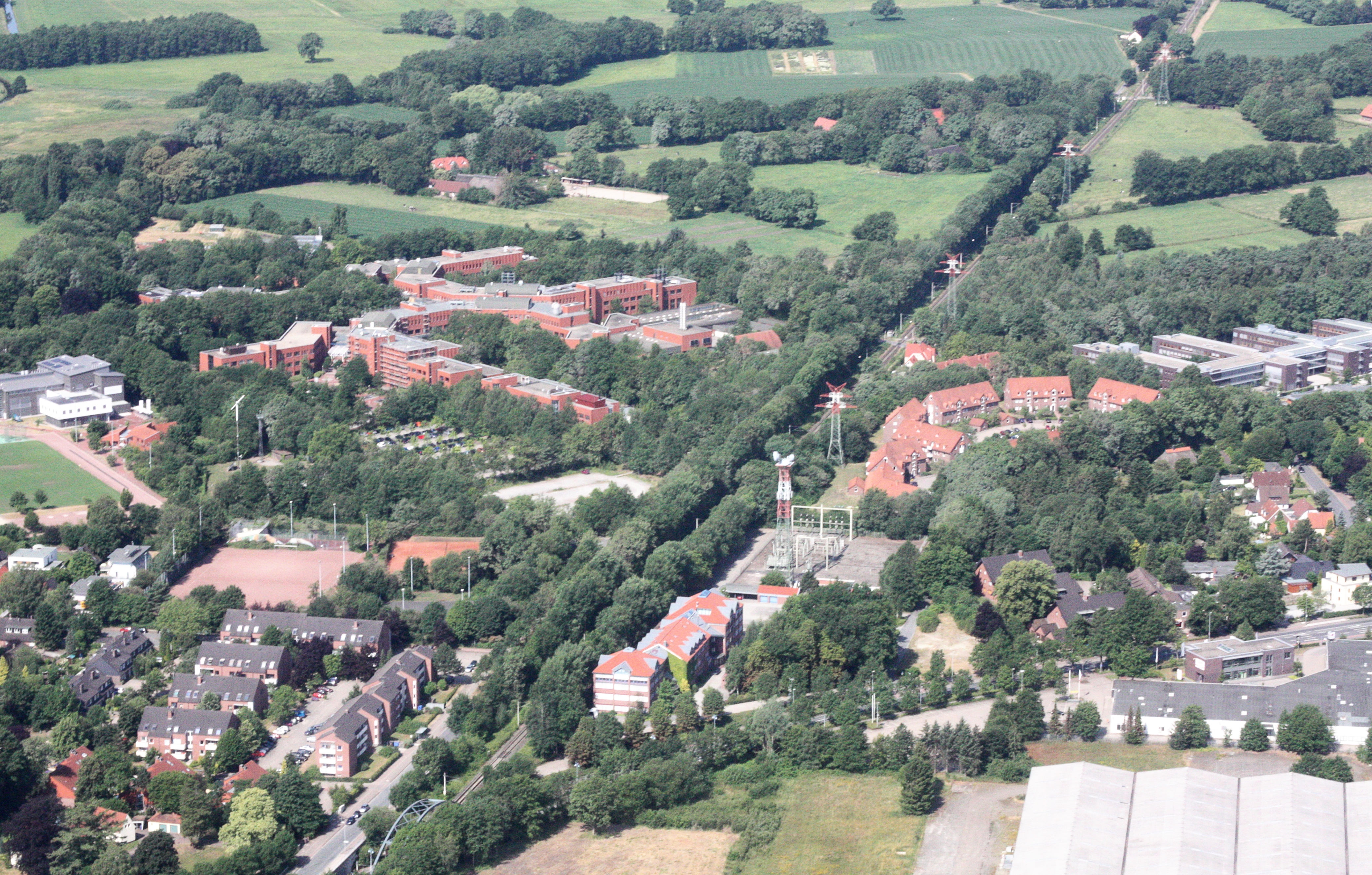 Luftaufnahmen Oldenburg (Oldenburg), mit Weiterflug nach Westen; 1500 Fuß Flughöhe; Juli 2010; Originalfoto bearbeitet: Tonwertkorrektur und Bild geschärft mit Hochpassfilter